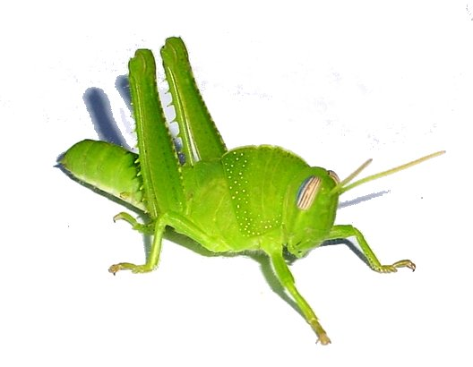 Anacridium aegyptium (juvenile stage) Subphylum: Hexapoda Ordo: Orthoptera Subordo: Caelifera Familia: Acrididae